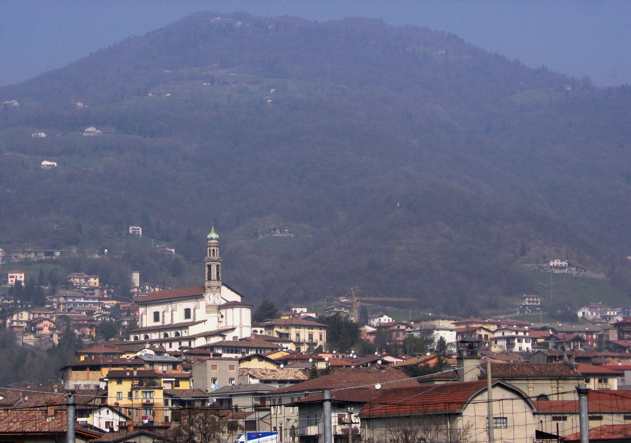 Vertova, Bergamo, Italia